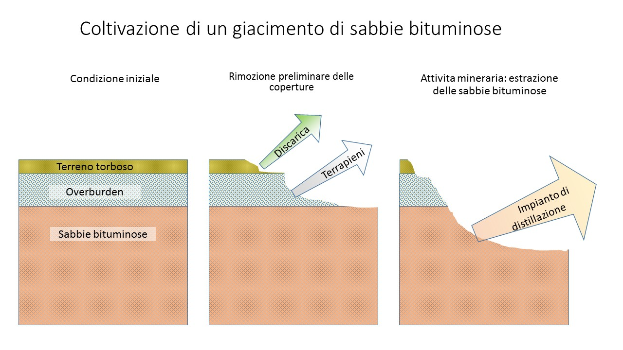 Schema di coltivazione di un giacimento di sabbie bituminose